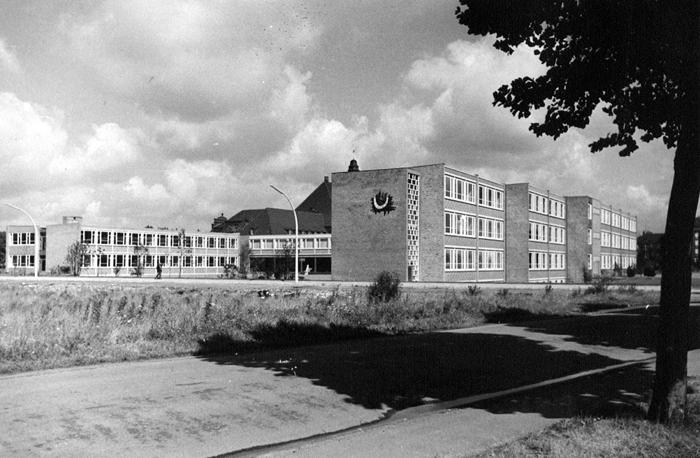 Scann eines Fotos. Realschule Rheinhausen von der Friedrich-Ebert-Straße aus. Heutiger Alter Neubau vorne rechts im Bild. Aufgenommen 1961